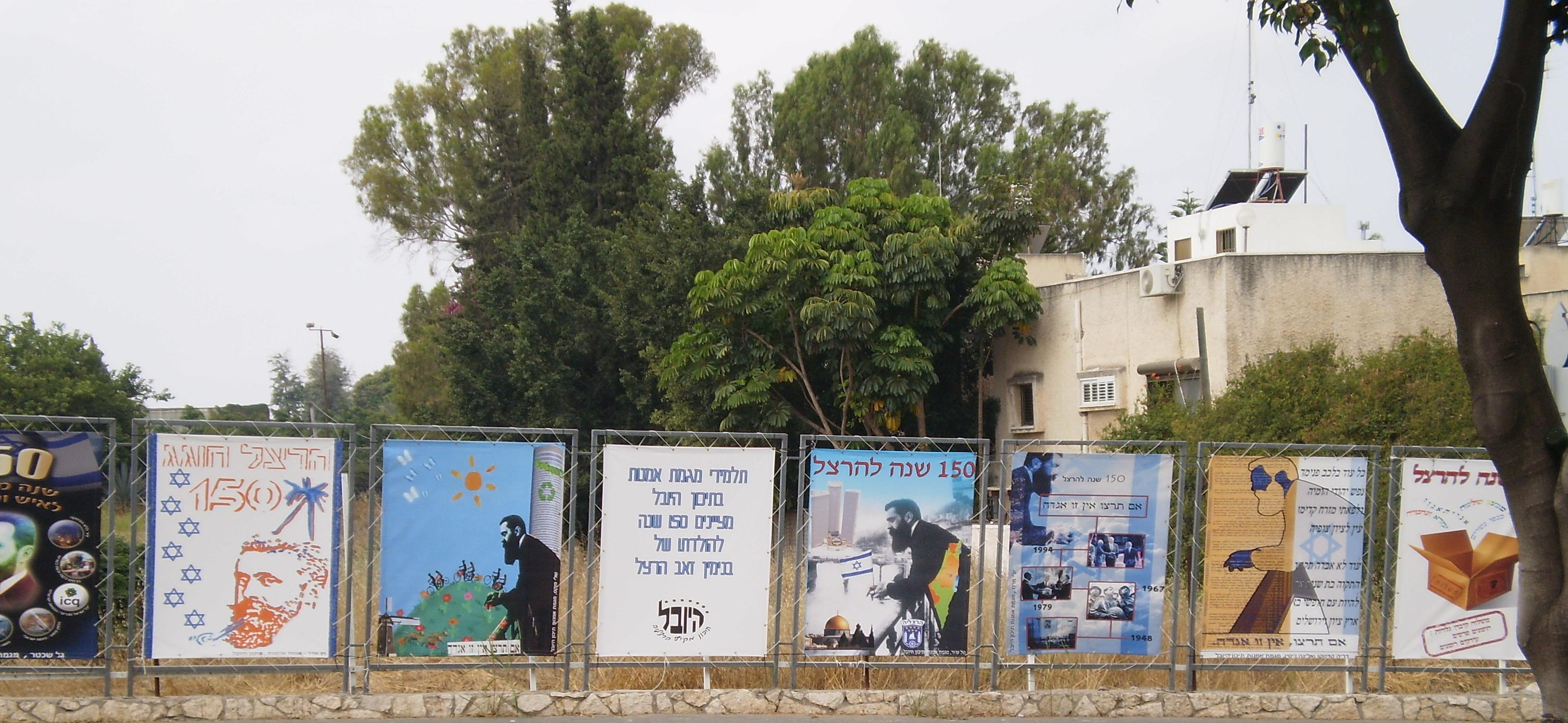 תצוגה של כרזות בנושא "150 להולדתו של בנימין זאב הרצל", מעשה ידי תלמידי מגמת אמנות בתיכון "היובל" בהרצליה, מוצגת בפינת הרחובות הרב קוק ואהרונסון בהרצליה